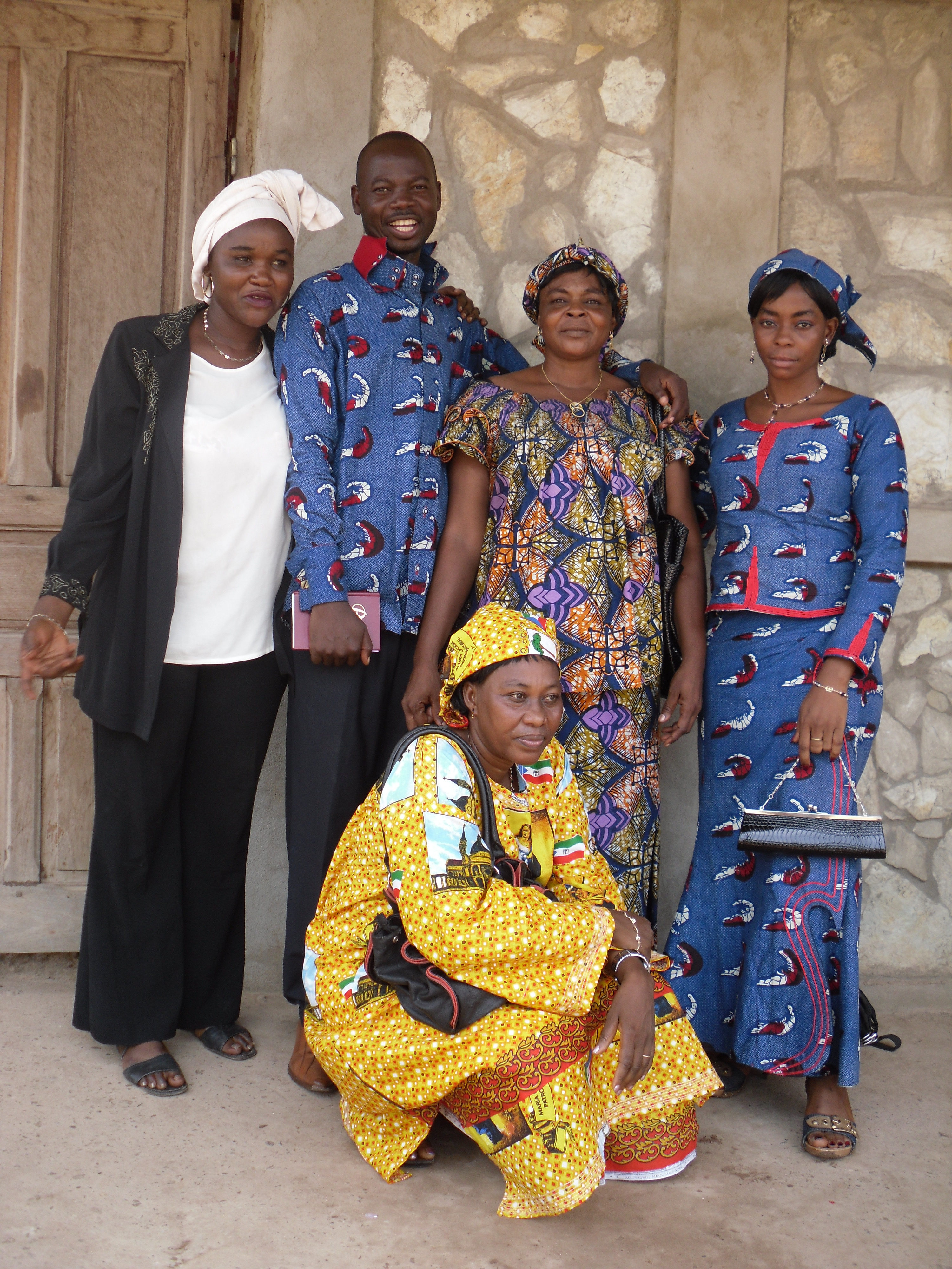 Hommes et femmes habillés en model Centrafricain This is an image of Cultural Fashion or Adornment from Central African Republic